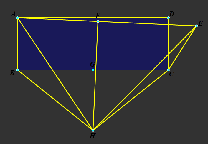 无效证明的一道题。